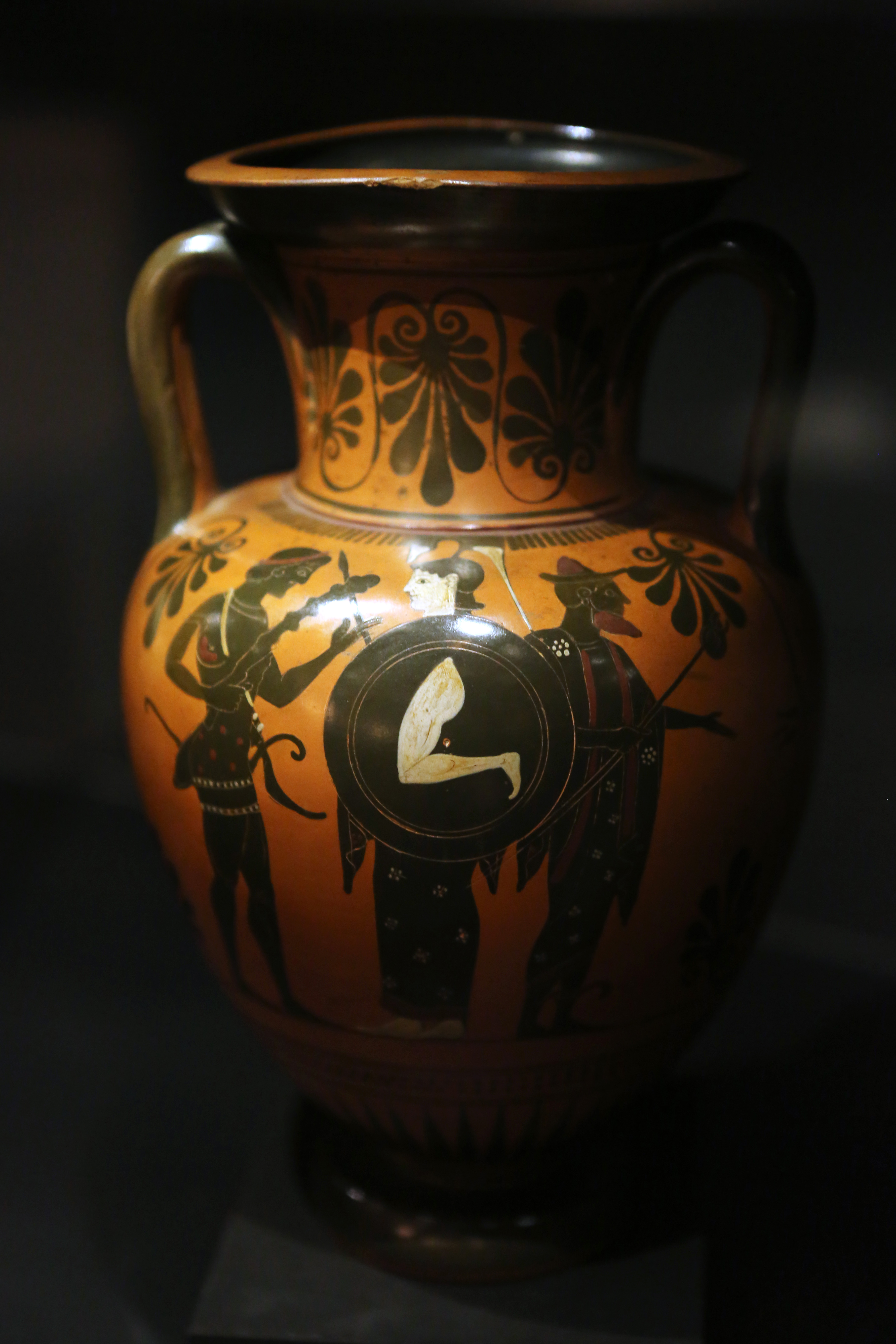 Amphore à figures noires du « Peintre d’Edimbourg » (Grèce, fin du VIe s. av. JC, 29 cm de haut). Conservé au sein de la Fondation Martin Bodmer. photo Naomi Wenger.